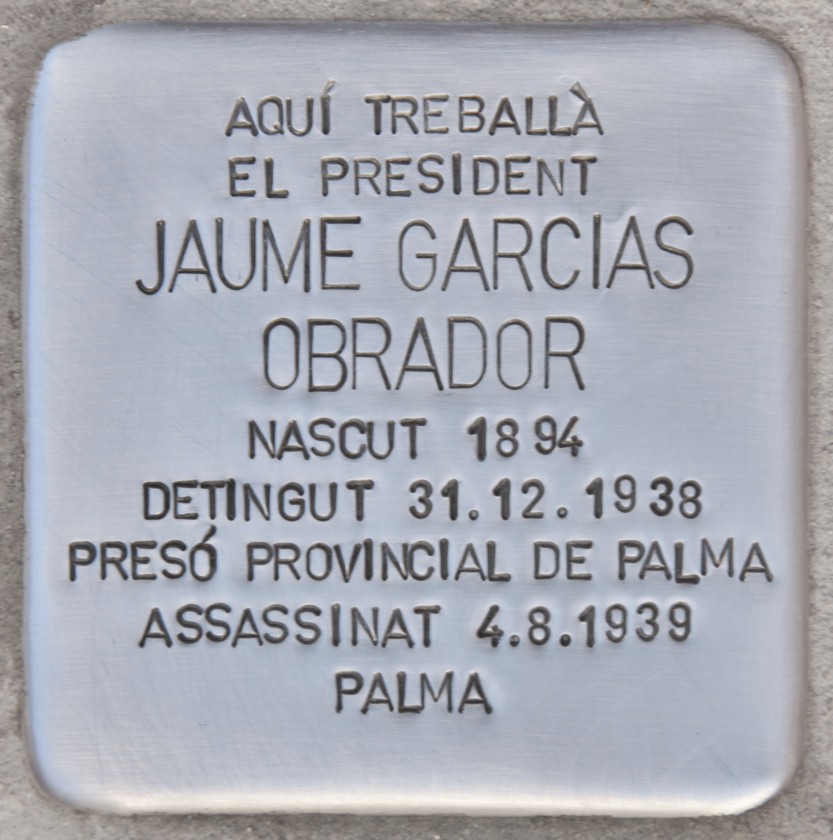 Remembrance Stone für Jaume Garcias Obrador